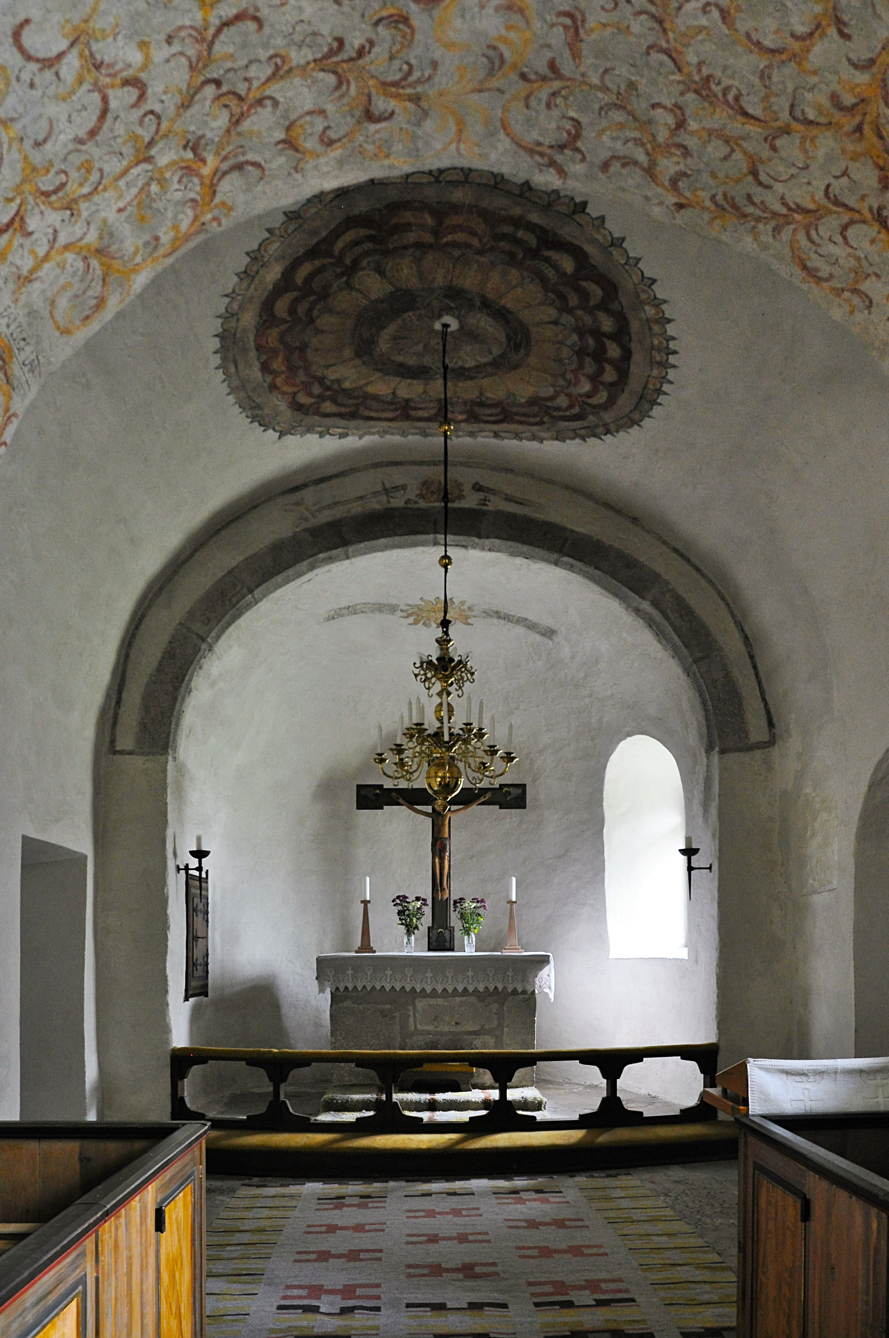 Fardhems kyrka (Fardhem Kyrkogården 1:1). Interiör; koret och altaret.